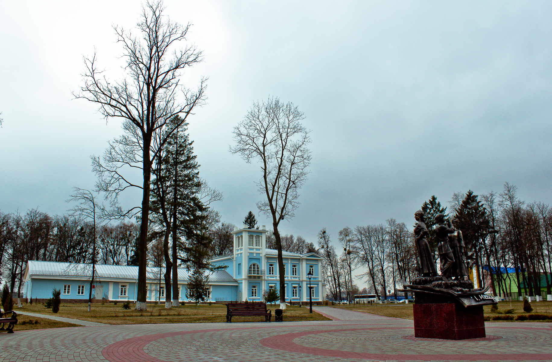 Беларуская (тарашкевіца): Фрагмэнты былой сядзібы: сядзібны дом, фрагмэнты парку. г. Хойнікі This is a photo of Belarusian heritage monument. Reference number: 313Г000786 ( WLM)